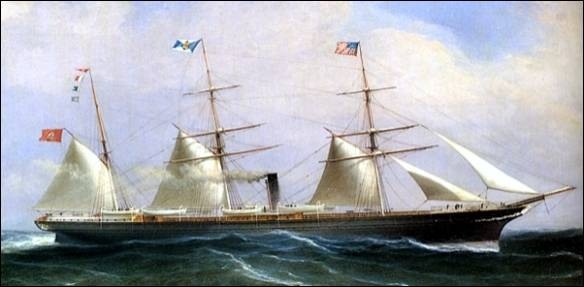 Der Hapag-Dampfer Borussia von 1856